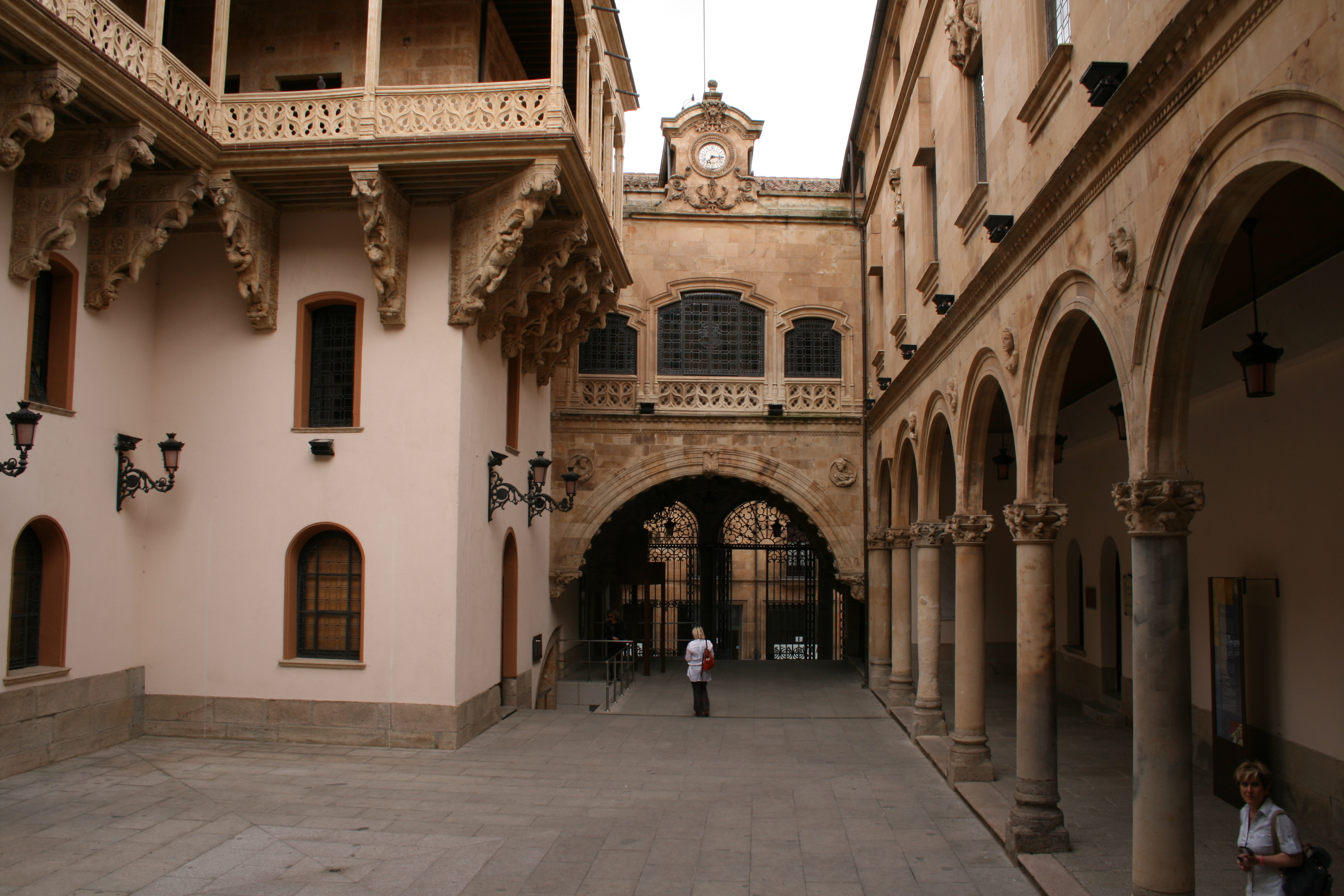 Palacio Salinas (Salamanca)